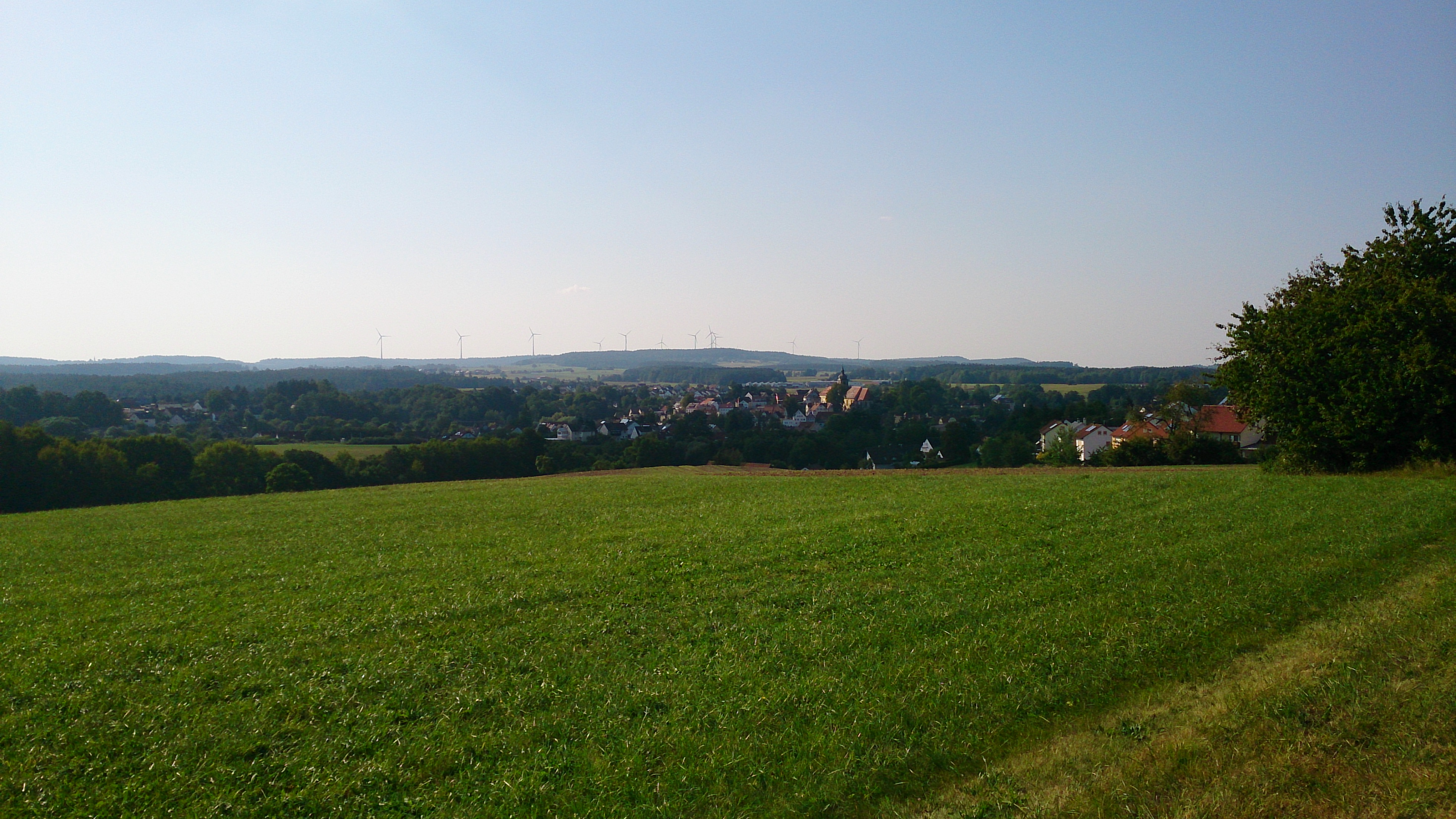 Ein Blick über Creußen.